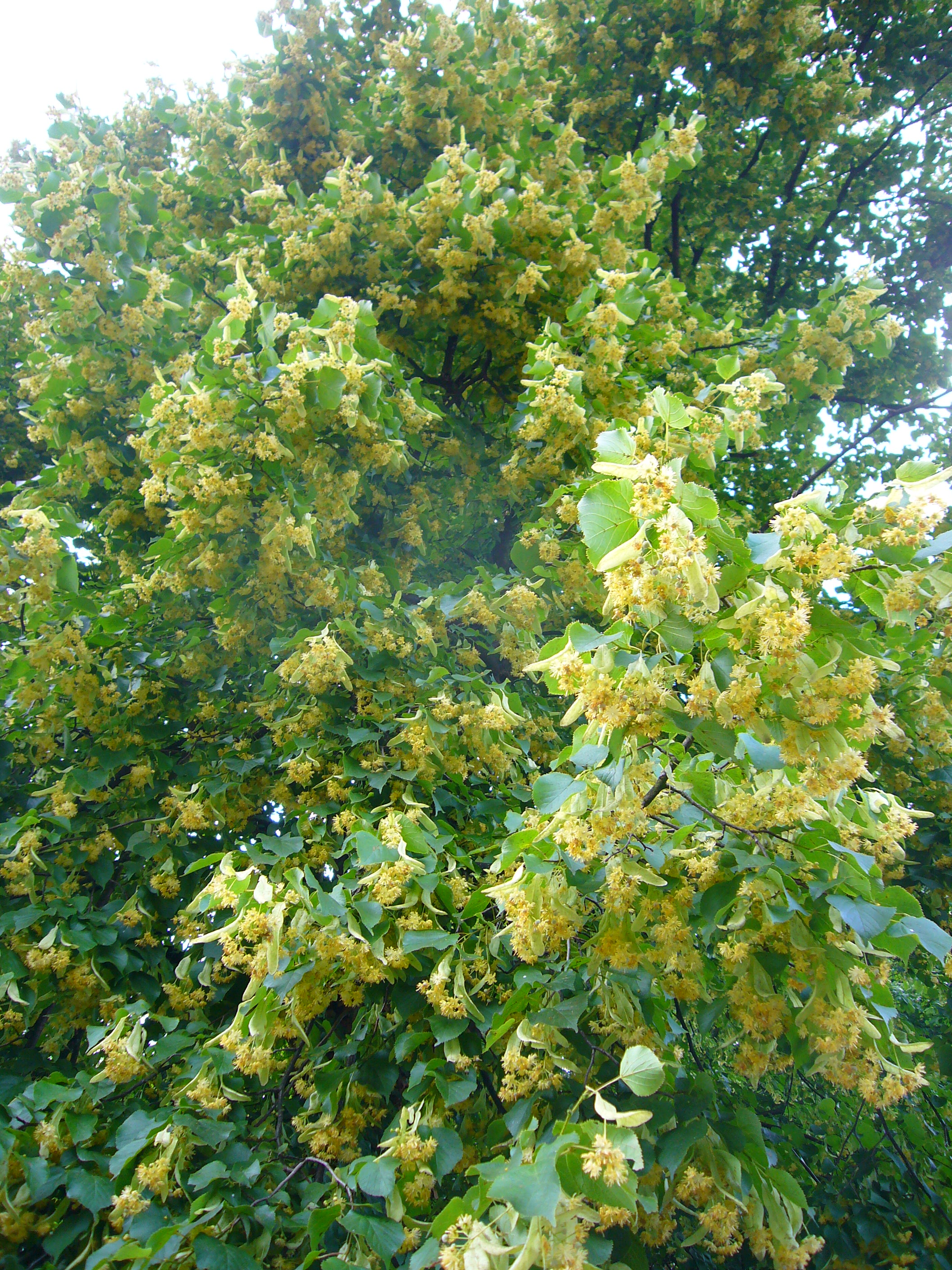 Tilia